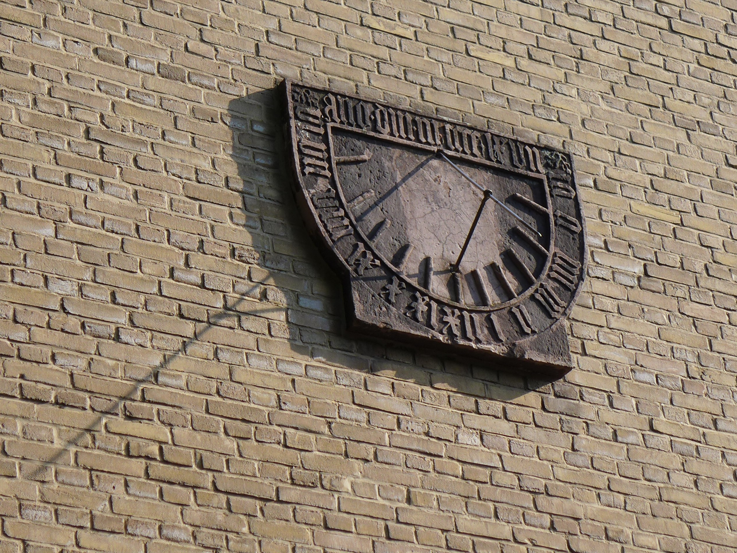 Dies ist die Sonnenuhr der Neustädter Kirche in Einbeck aus dem Jahr 1467. Nach dem Abbruch der Kirche im 20. Jahrhundert wurde sie an der Südseite des Neubaus der Neustädter Kirche angebracht.